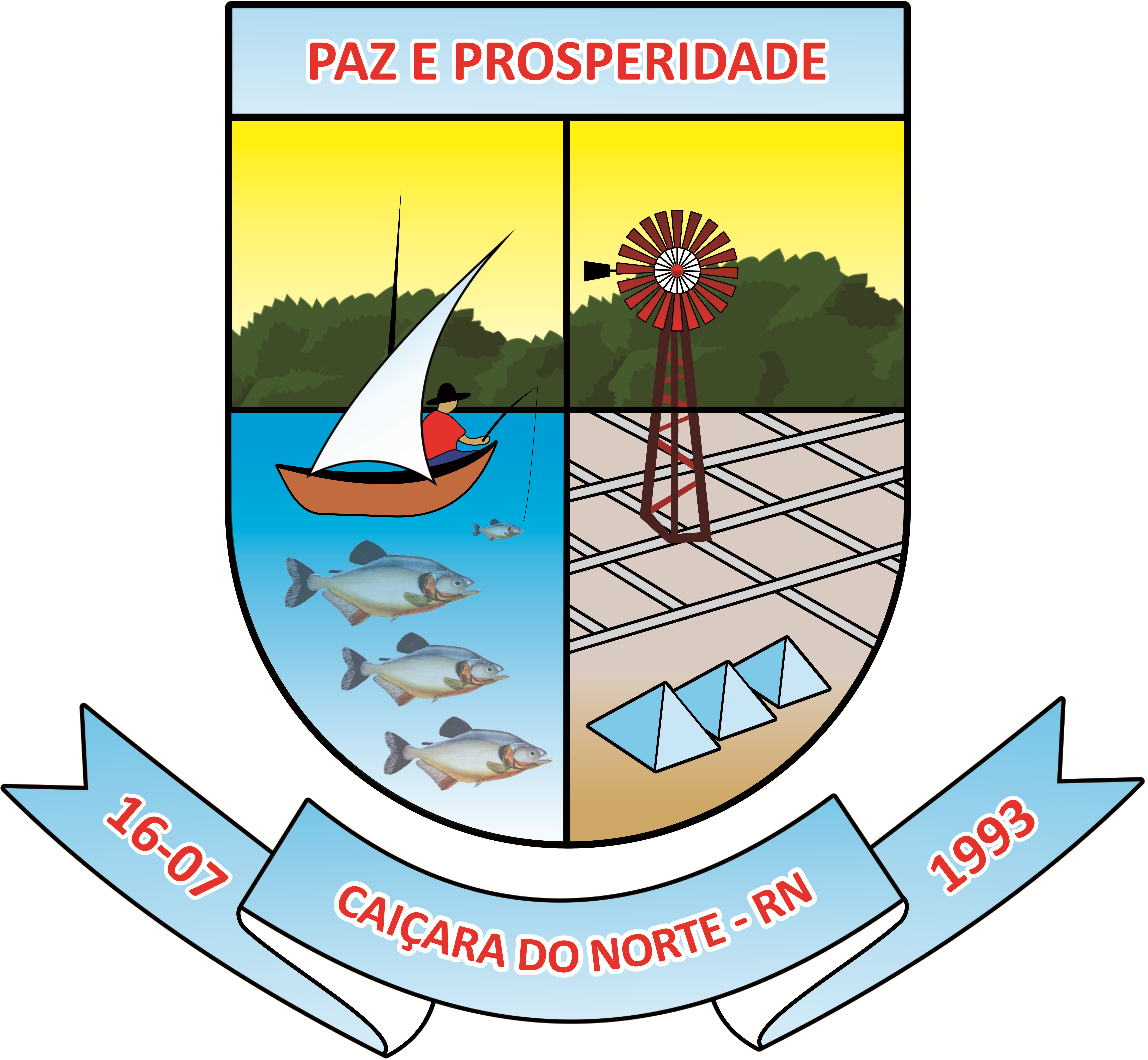 Brasão regulamentado pela Lei Municipal nº 138 de 19 de maio de 2011. BRASÃO DE ARMAS: Estilo português, 8x7 módulos, lembrando a presença lusitana nas terras potiguares. Campo dividido em ângulos - simbolizando o clima, o solo fértil, o mar e as atividades que dão divisas econômicas para o município. Principalmente a indústria pesqueira. Nas faixas azuis cinza em letras vermelhas, o lema: PAZ E PROSPERIDADE, o topônimo do município e a data de sua emancipação política: 16 de julho de 1993.